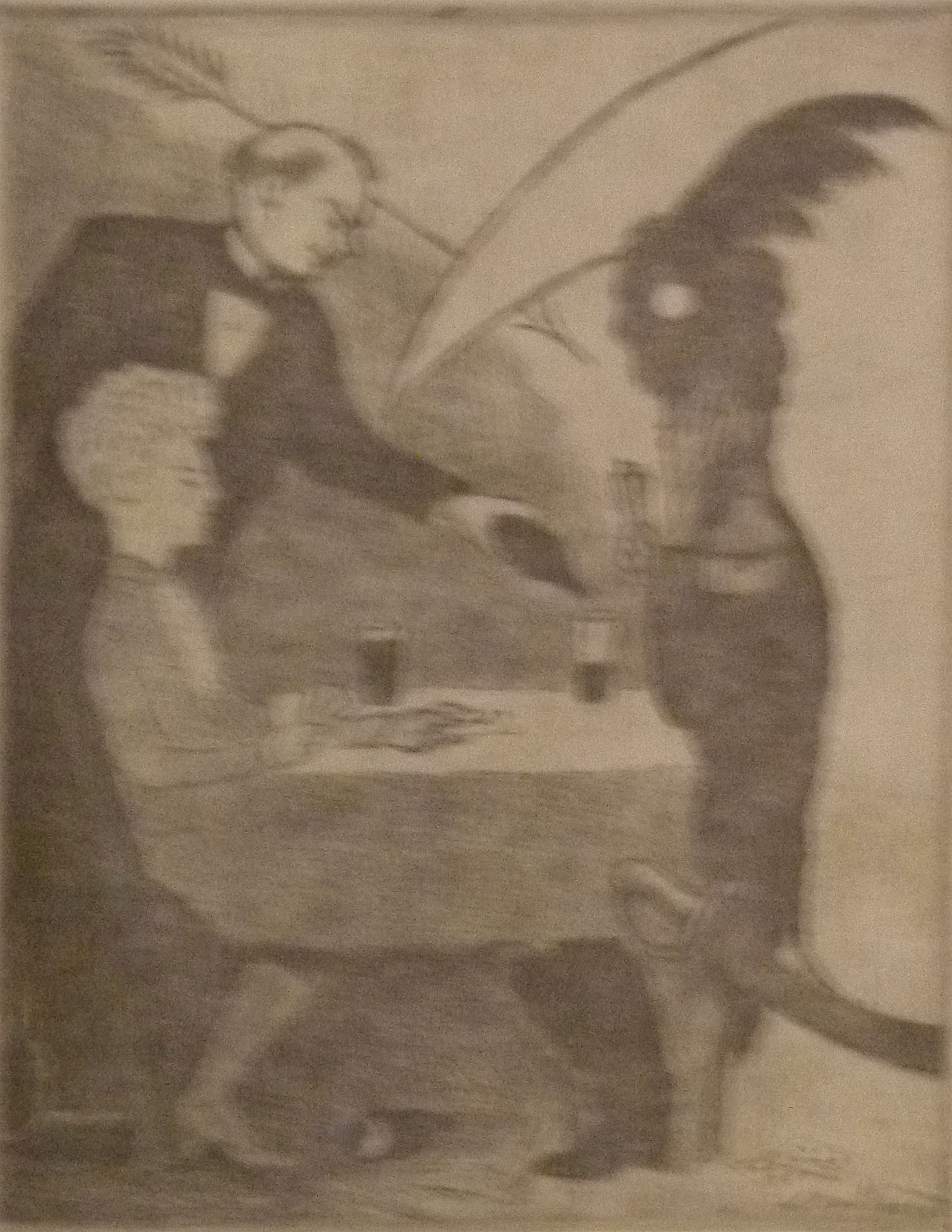 "La flèche et la faux", illustratie in de de bibliofiele uitgave Contes d'Horace Van Offel, verschenen in 1935; door de Belgische schilder Léon Spilliaert; getekend ; 19x 14 cm; privébezit